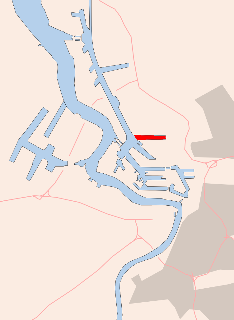 Antwerp , Churchilldok